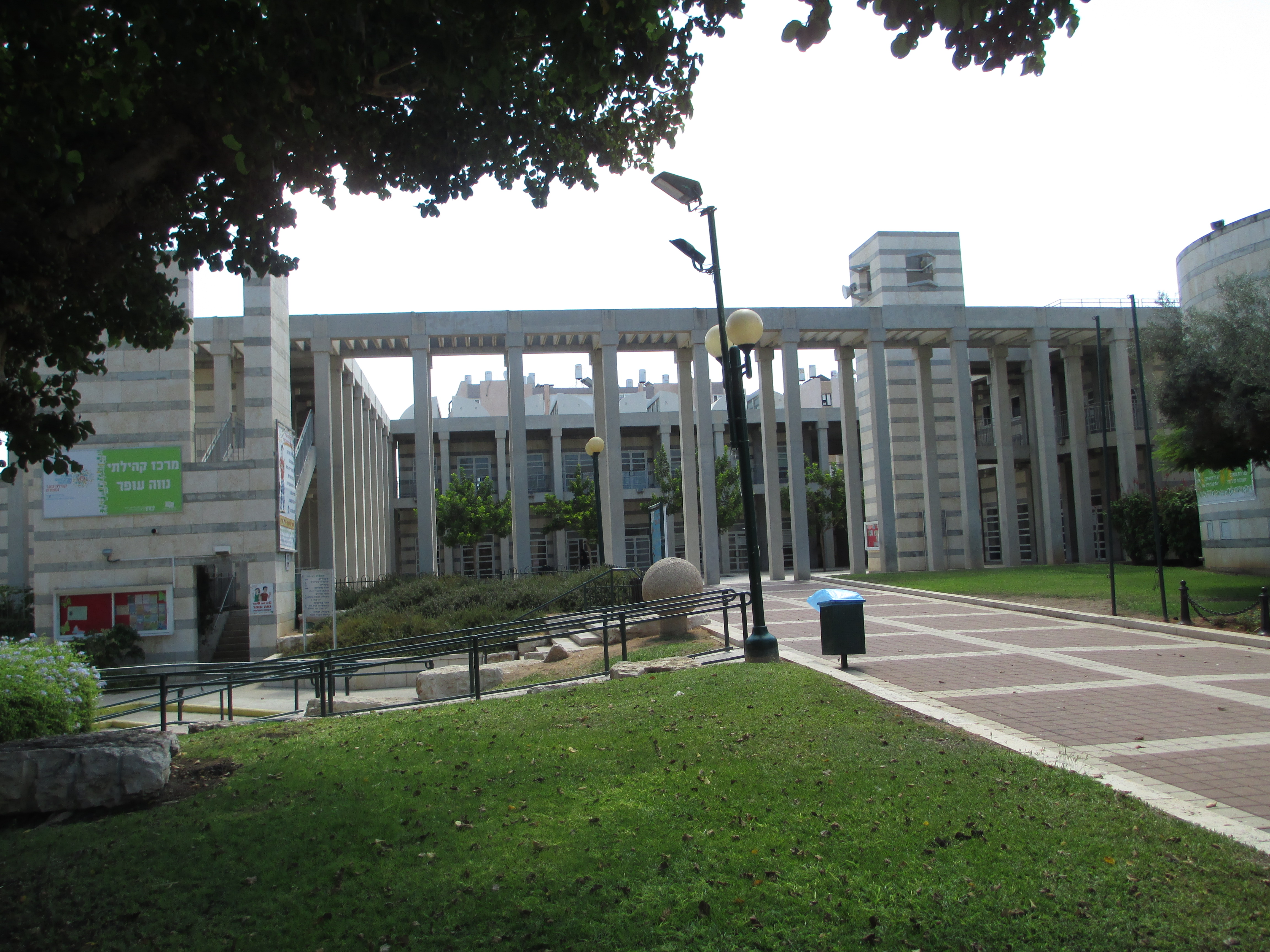 מרכז קהילתי נווה עופר בשכונת נווה עופר בתל אביב